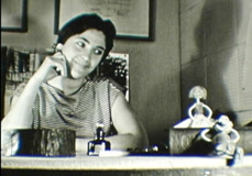 Corto con munecos animados combinados con la actriz Lolot Prat.